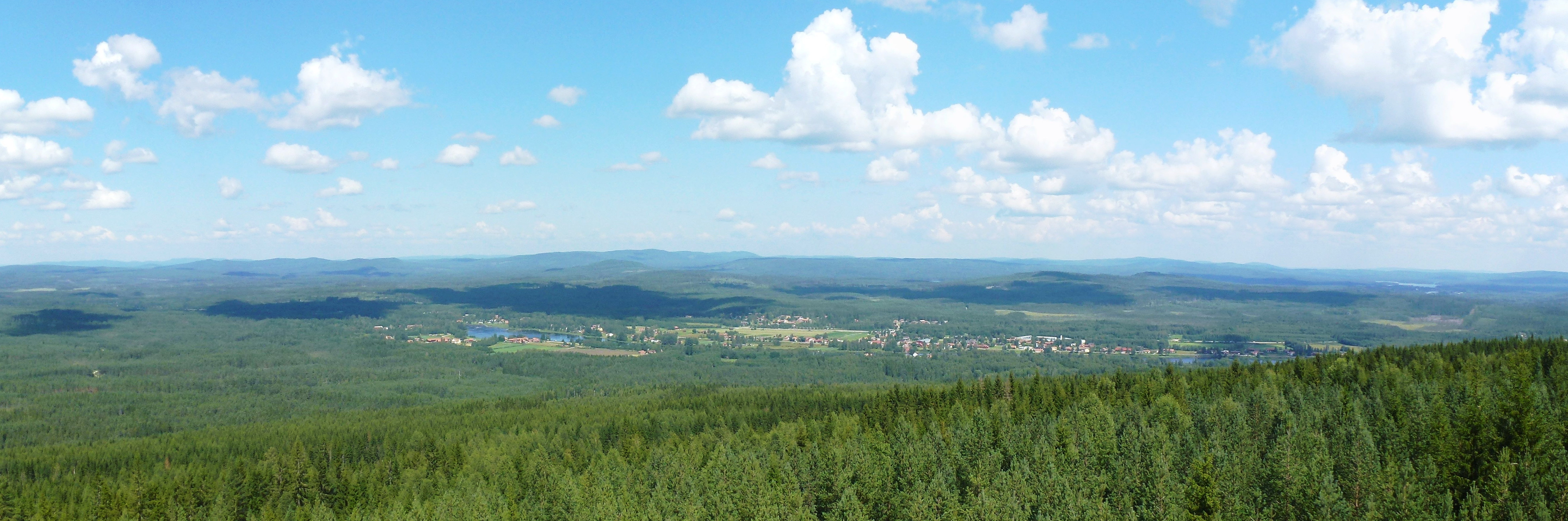 Vy från Majdåsens utsiktstorn